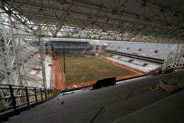 Arena do Pantanal durante processo de plantio do gramado para a Copa do Mundo de 2014.